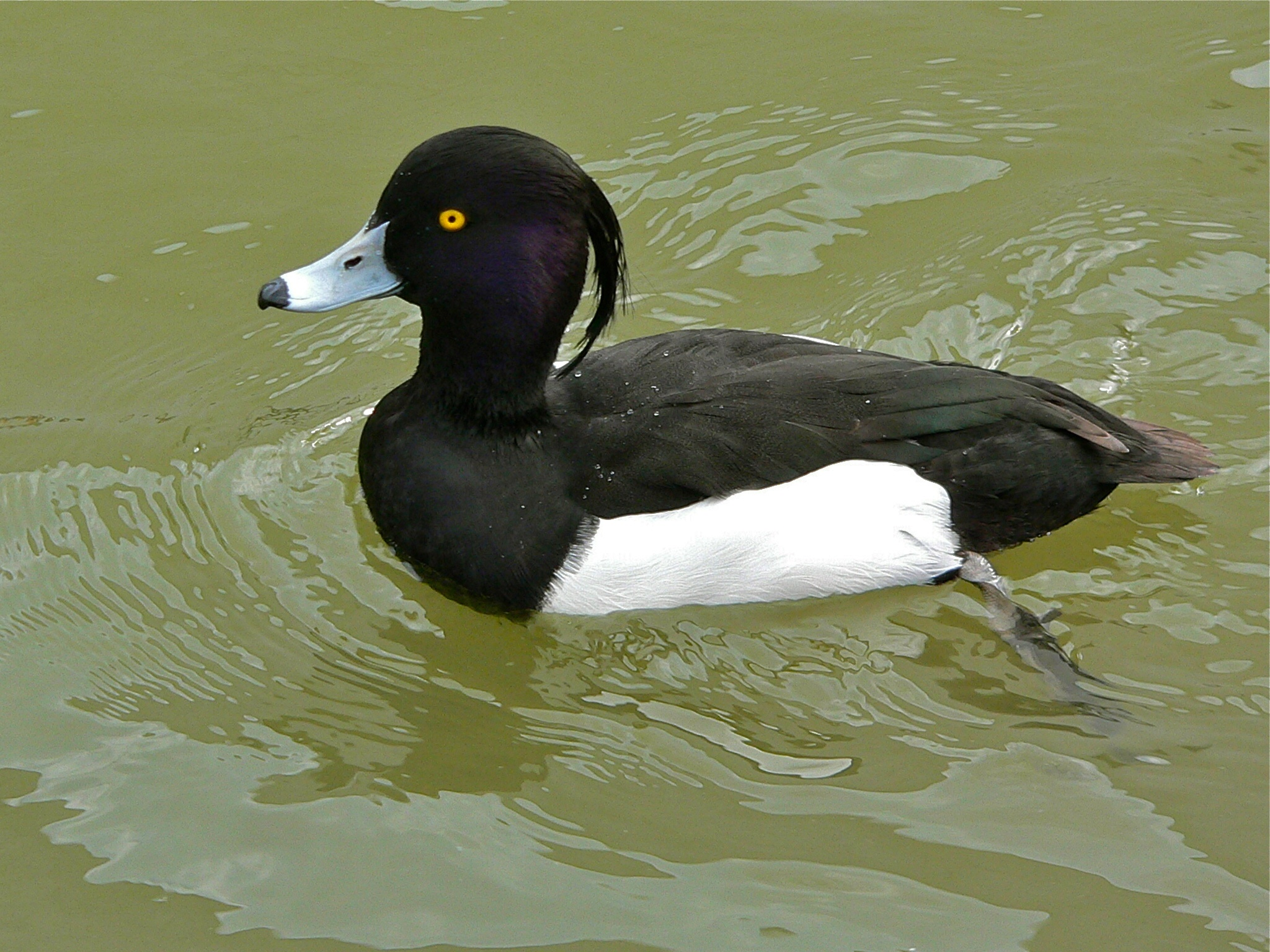 Parc Phoenix, Nice, Alpes-Maritimes, FRANCE